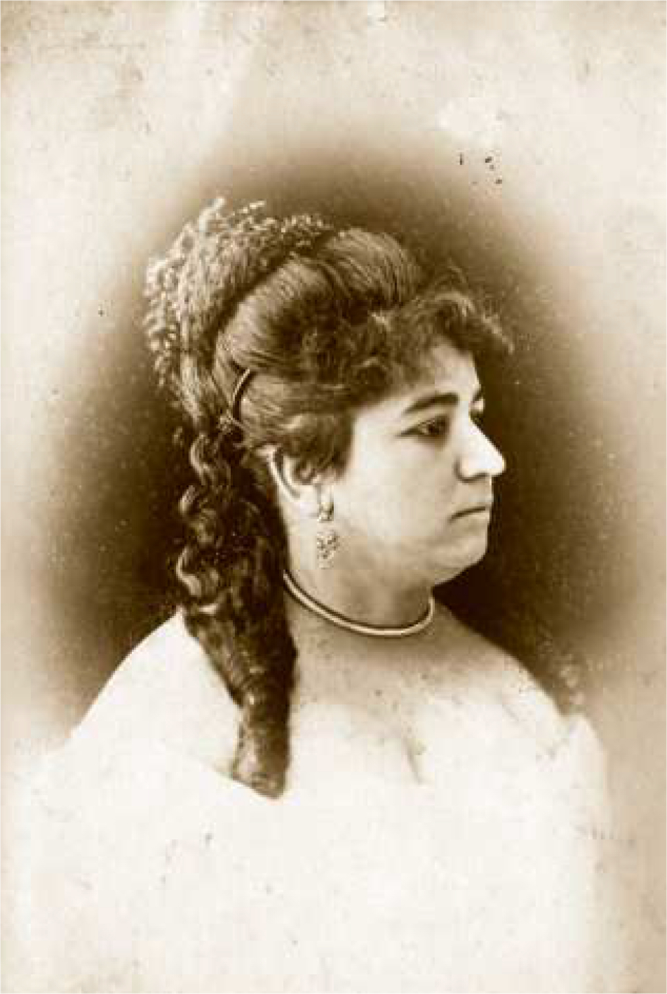 Foto de Carolina Casanova de Cepeda.